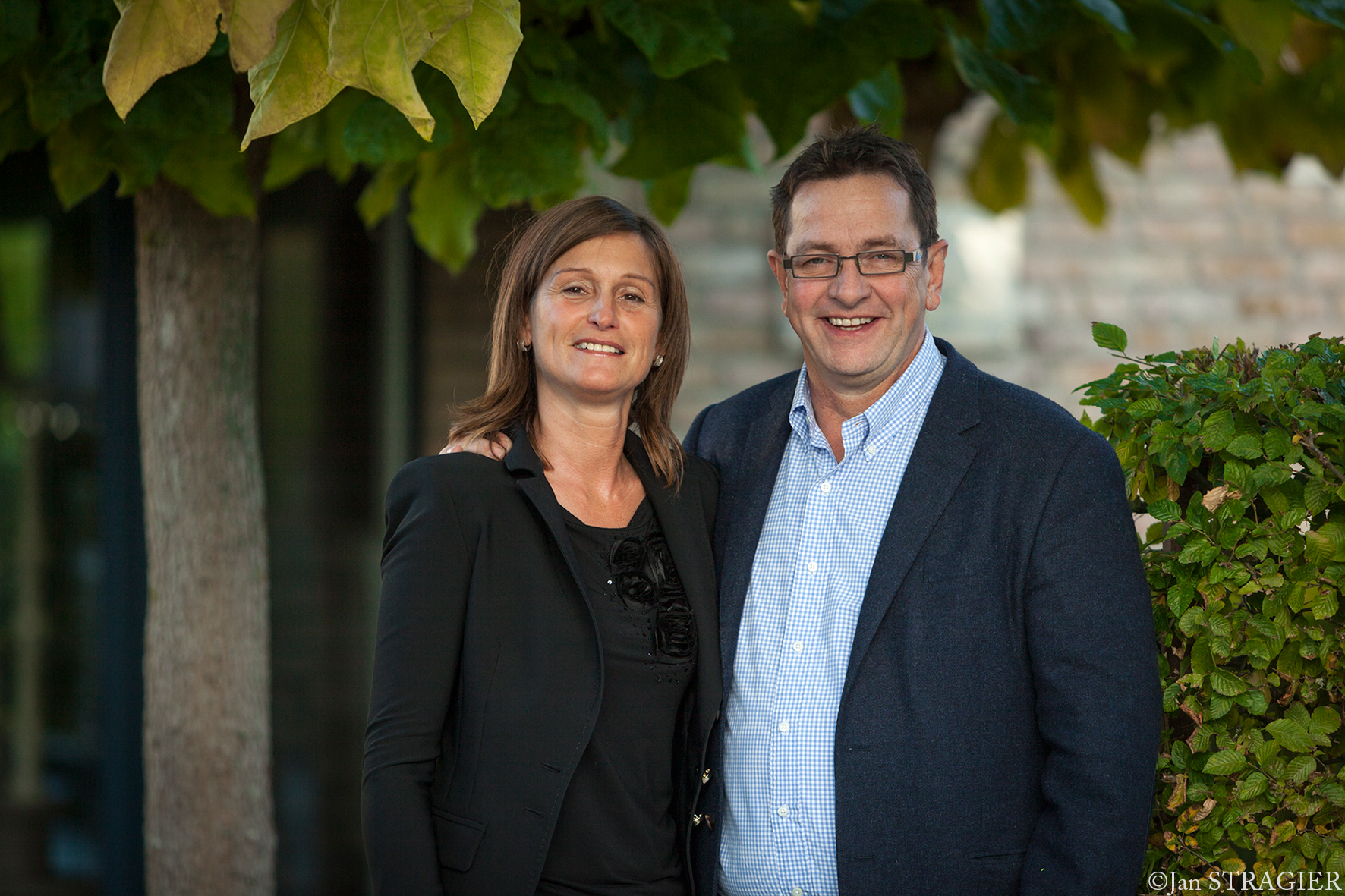 NIEUWE BURGEMEESTER VAN MOORSLEDE WARD VERGOTE EN VROUW HILDE VIENNE